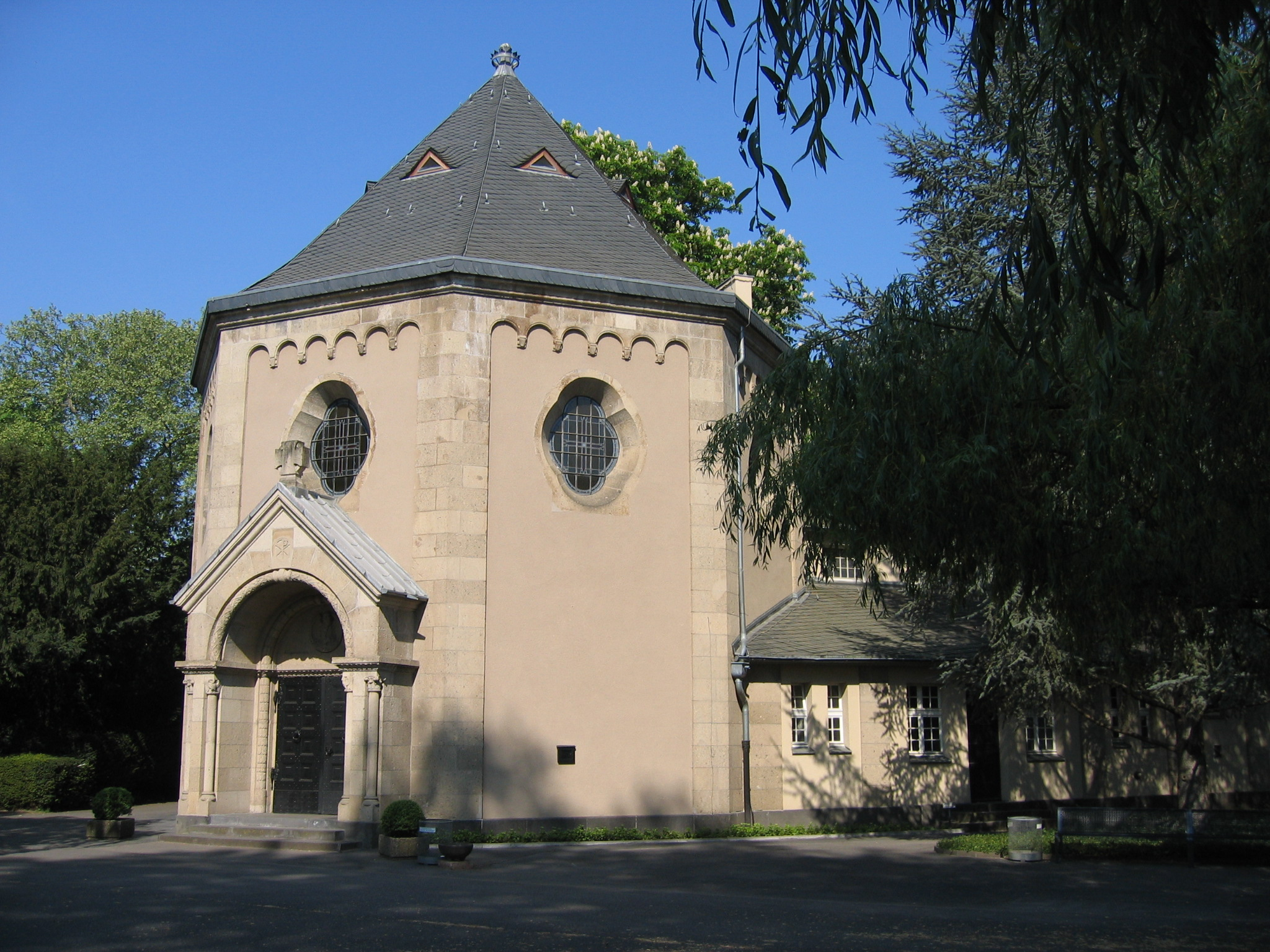 Südfriedhof (Köln)